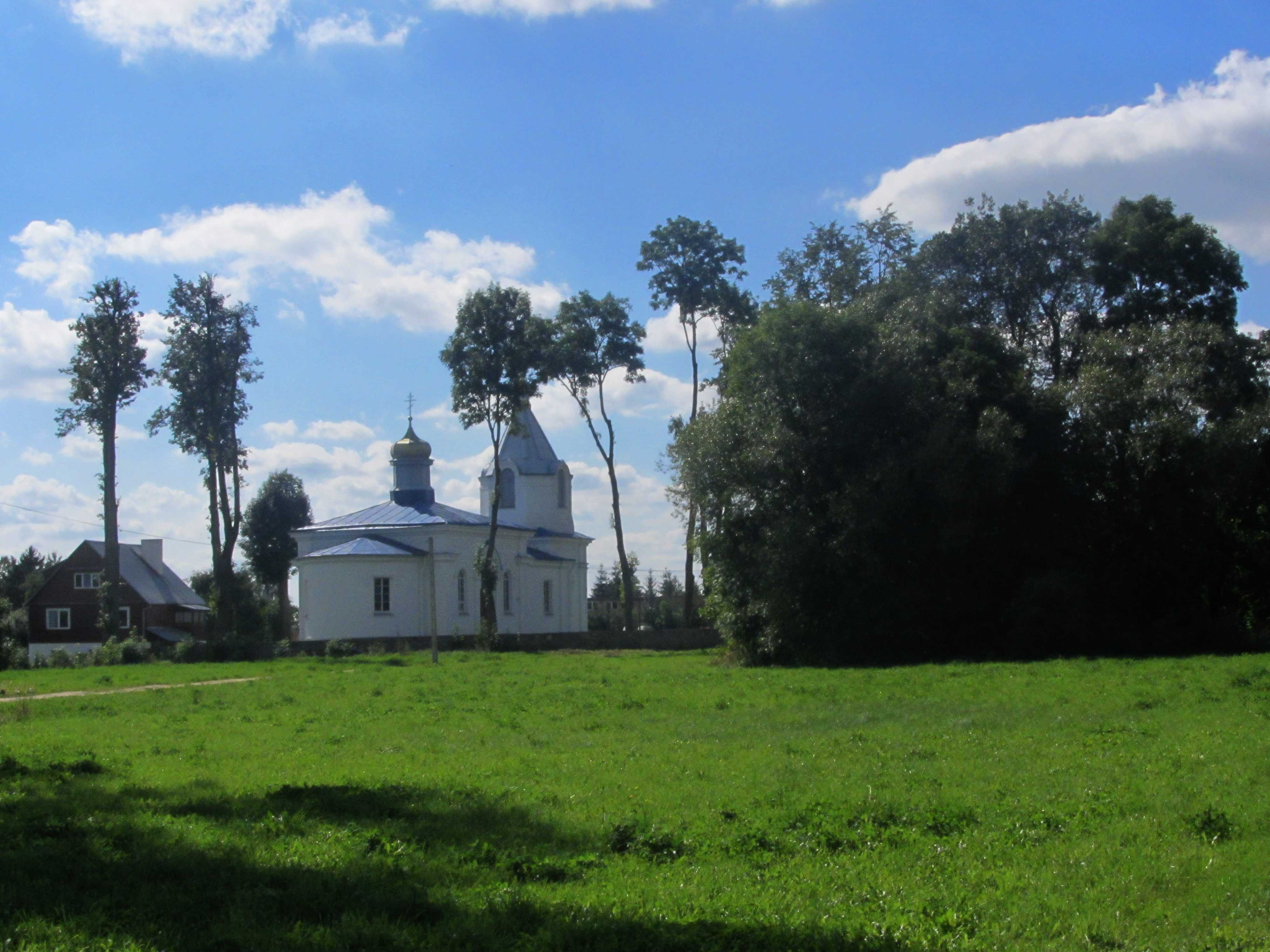 Topilec - zespół cerkwi prawosławnej: Cerkiew prawosławna parafialna p.w. św. Mikołaja (zabytek nr 368 z 23.10.1975)